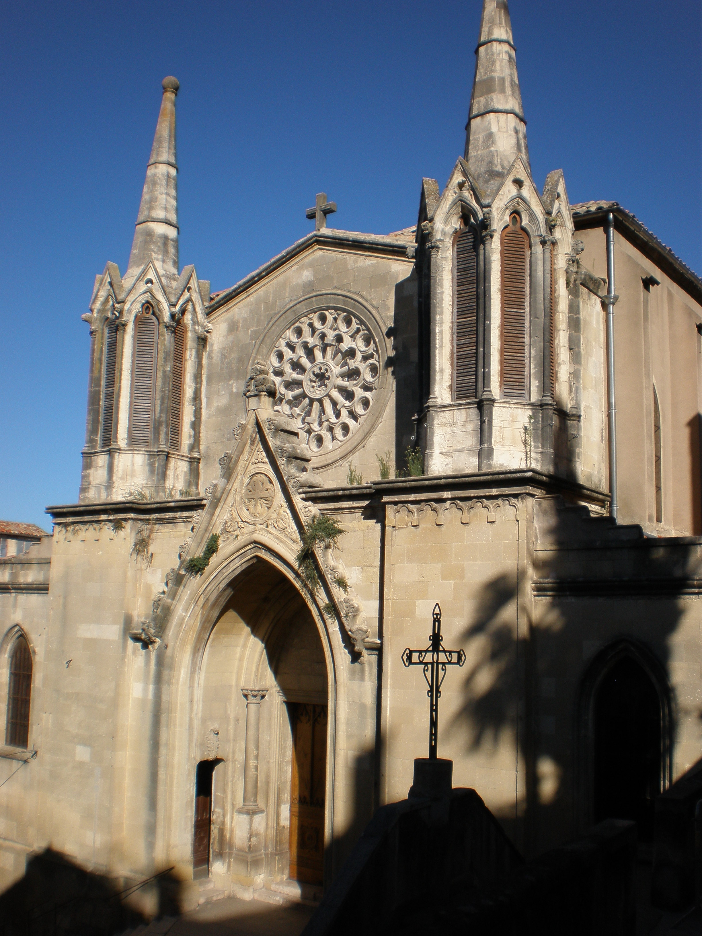 église Saint-Pons de Sommières (Gard, France)